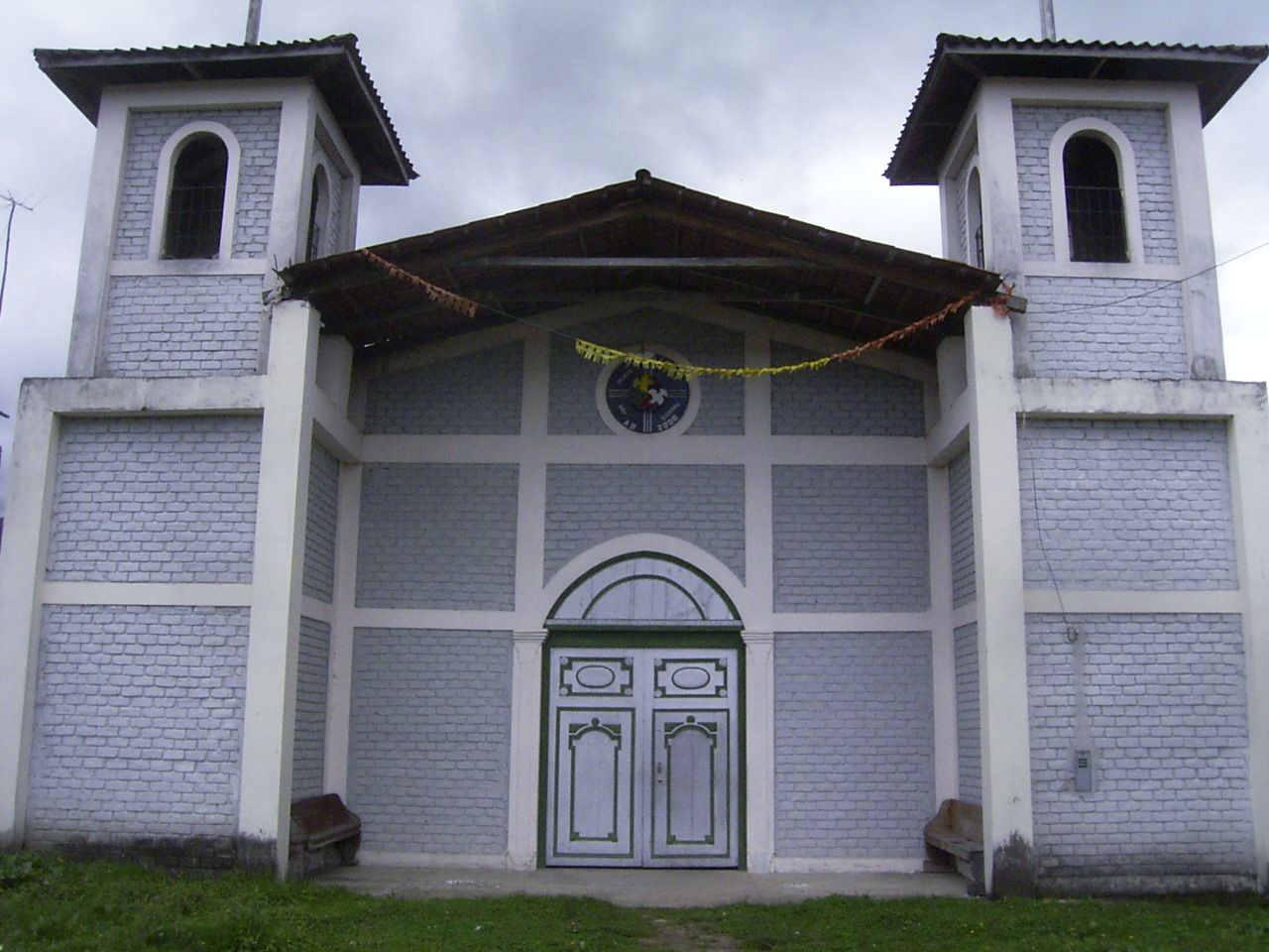 iglesia de Molinopampa, Chachapoyas, Amazonas, Peru.